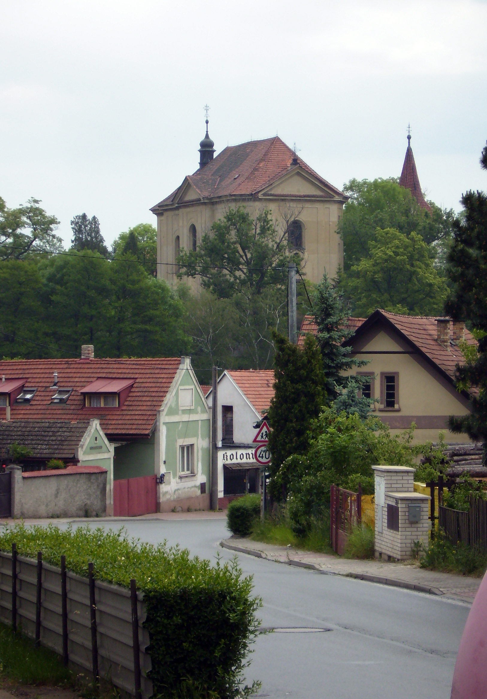 Silnice s kostelem v Zápech.